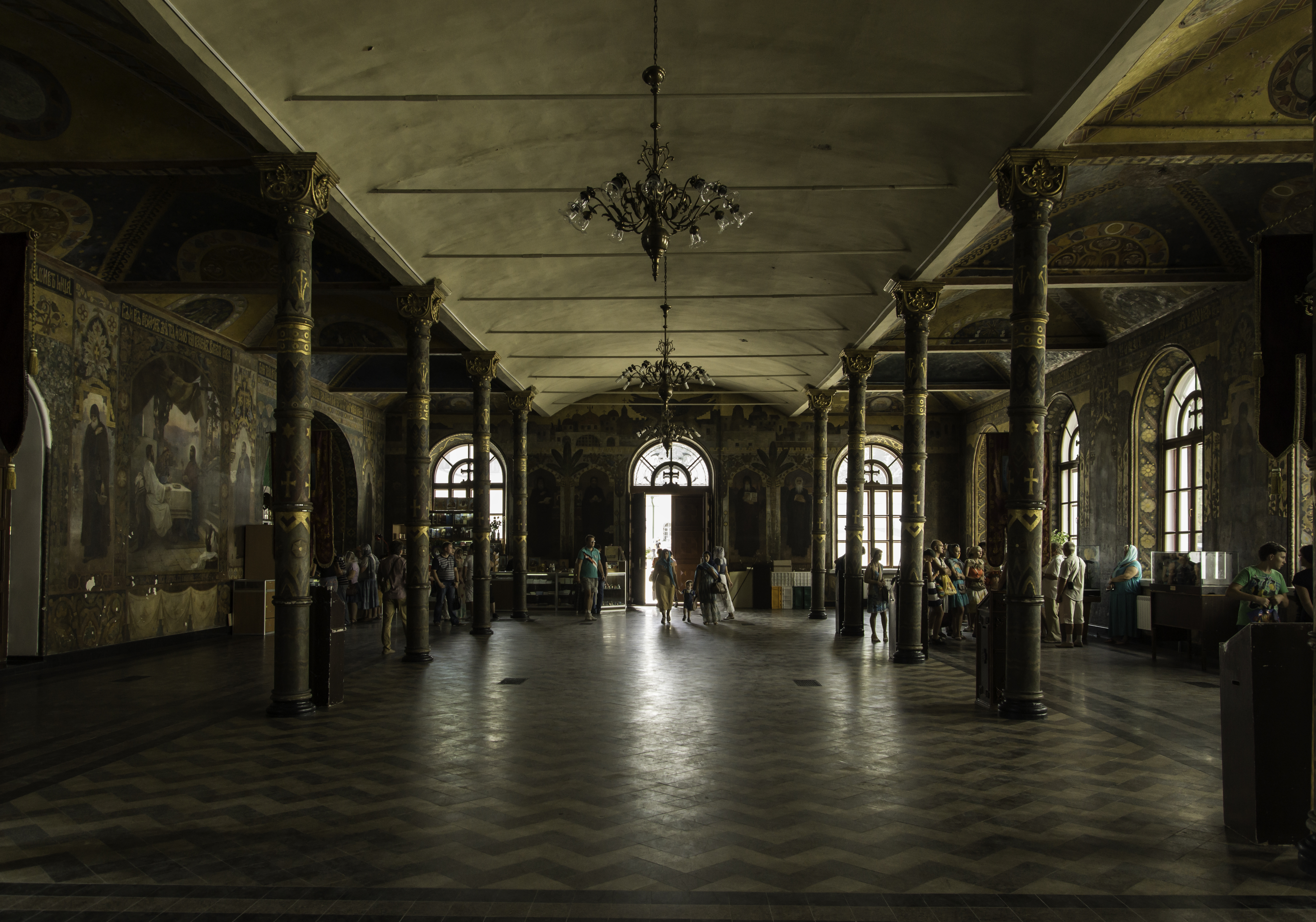 Палата трапезна з церквою Антонія і Феодосія, м. Київ